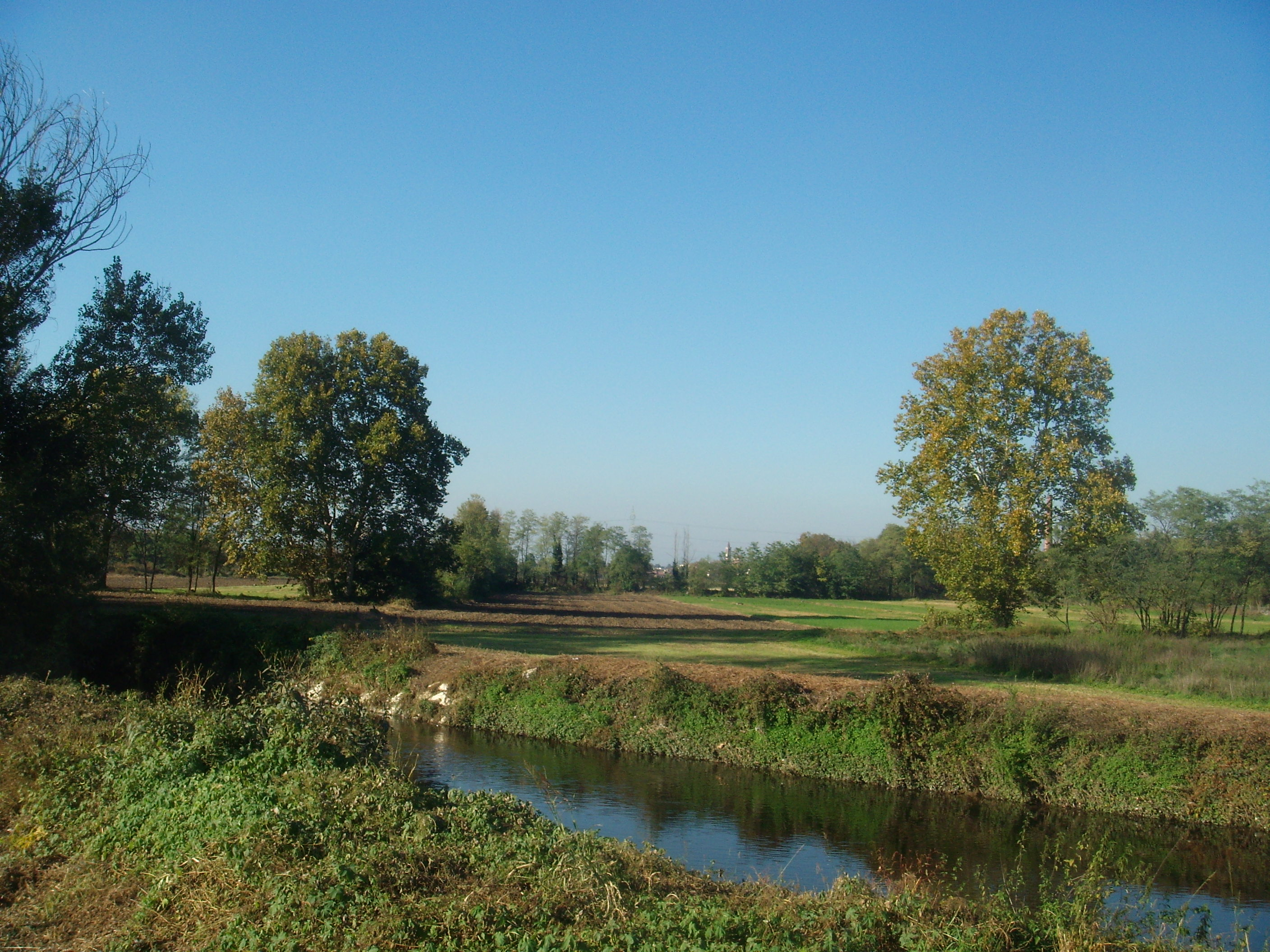 Fiume Olona This is a photo of a monument which is part of cultural heritage of Italy.